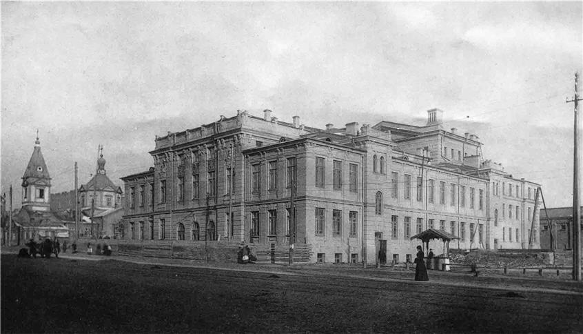 Киев, Троицкий народный дом